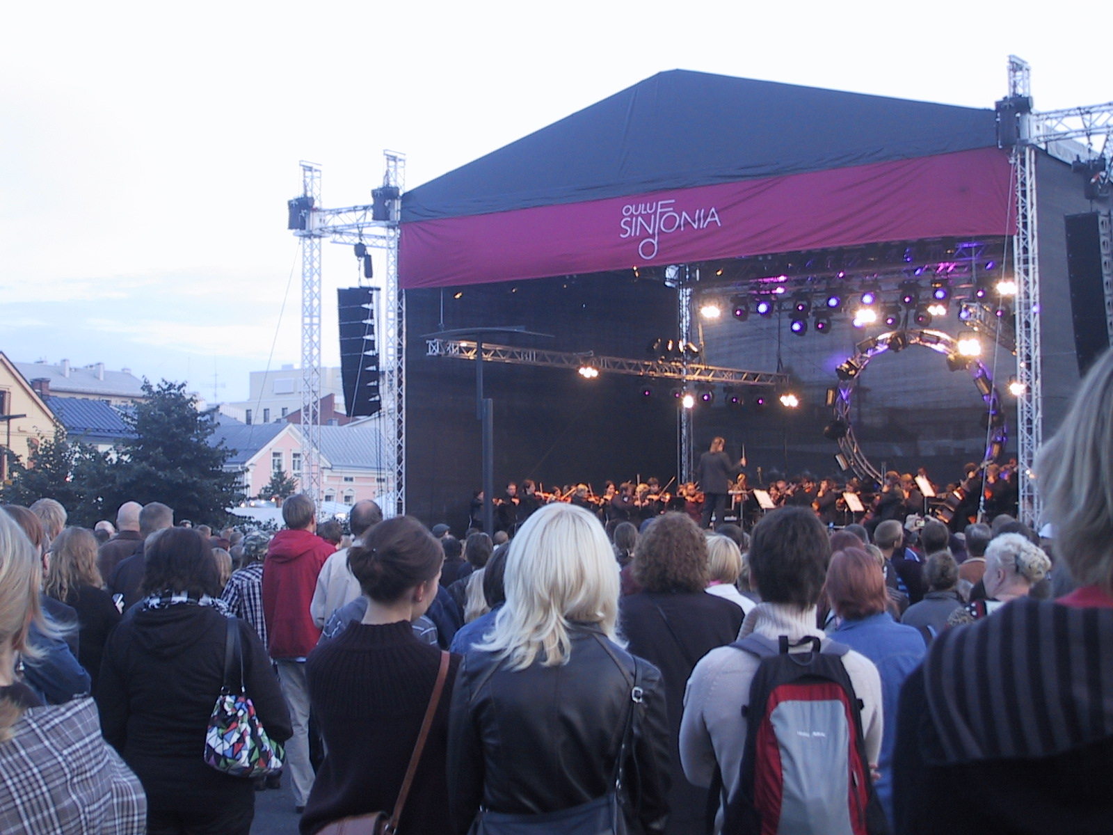 Oulu Sinfonia esiintyy Korttelihaipakka 2008 -tapahtumassa Oulussa.